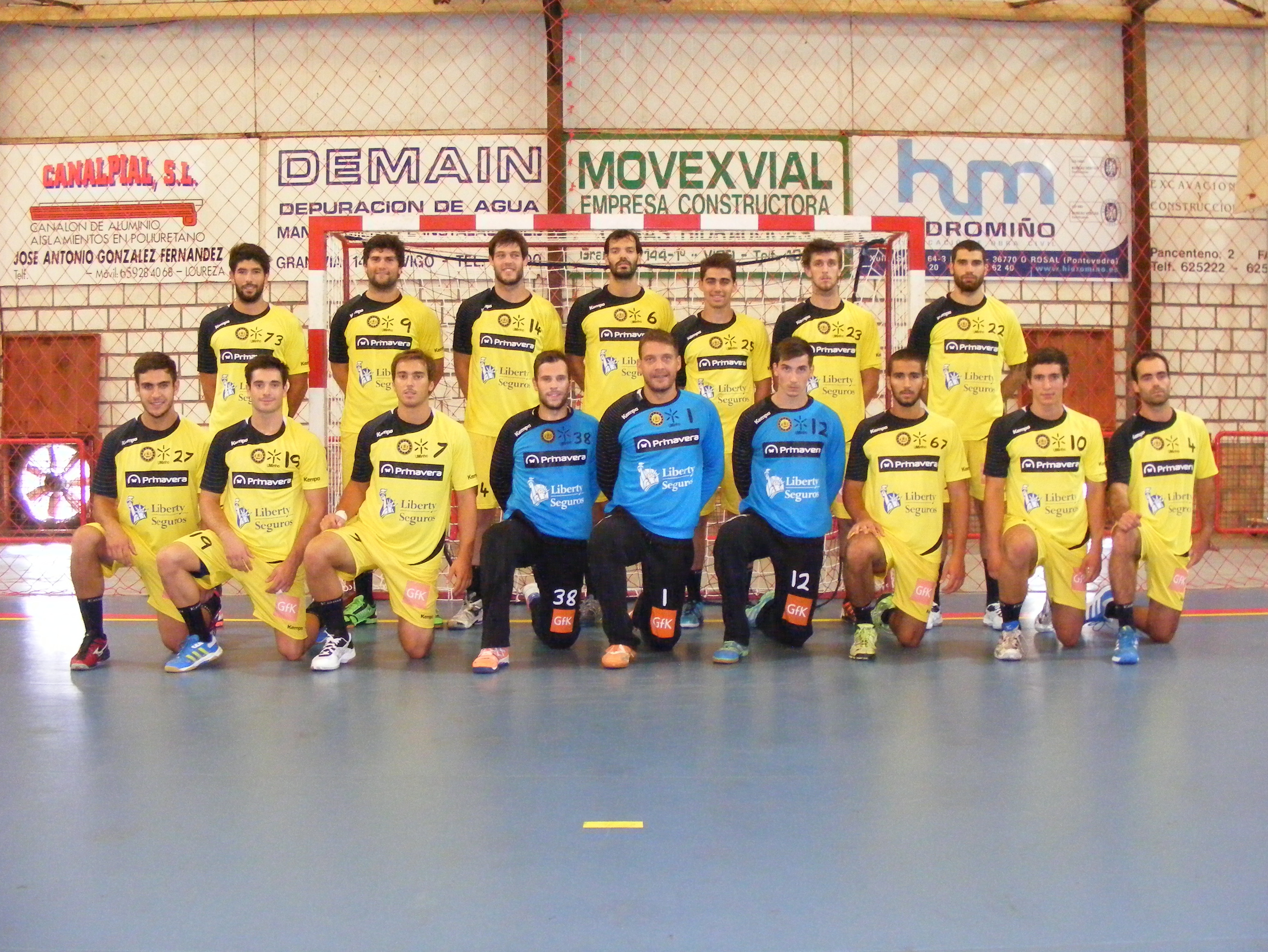 Plantilla del ABC Braga en el Torneo Concello do Rosal 2013.